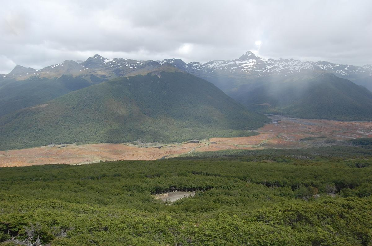 Vista Panorámica de una porción sur del Parque Karukinka en Tierra del Fuego, Región de Magallanes, Chile.